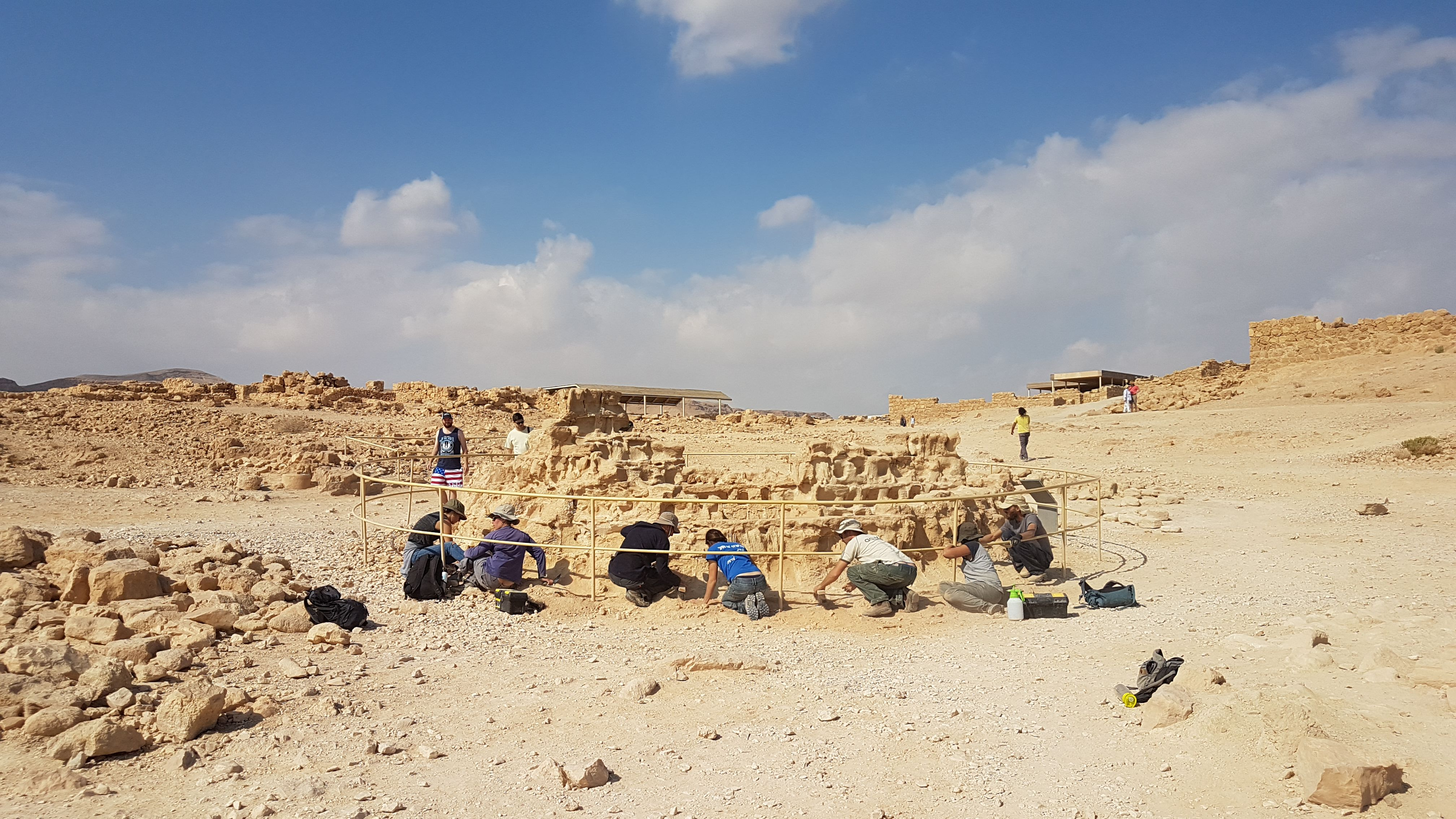 קורס שימור מעשי מחזור ד במצדה